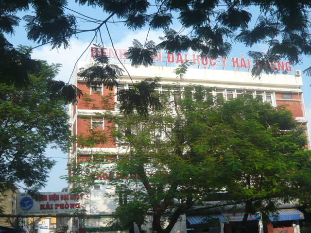 bệnh viện đại học Y Hải Phòng, một bộ phận quan trọng của trường đại học Y Hải Phòng.